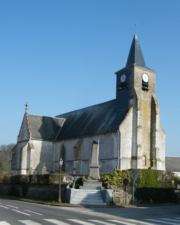 L'église Saint-Martin de Regnière-Ḗcluse.